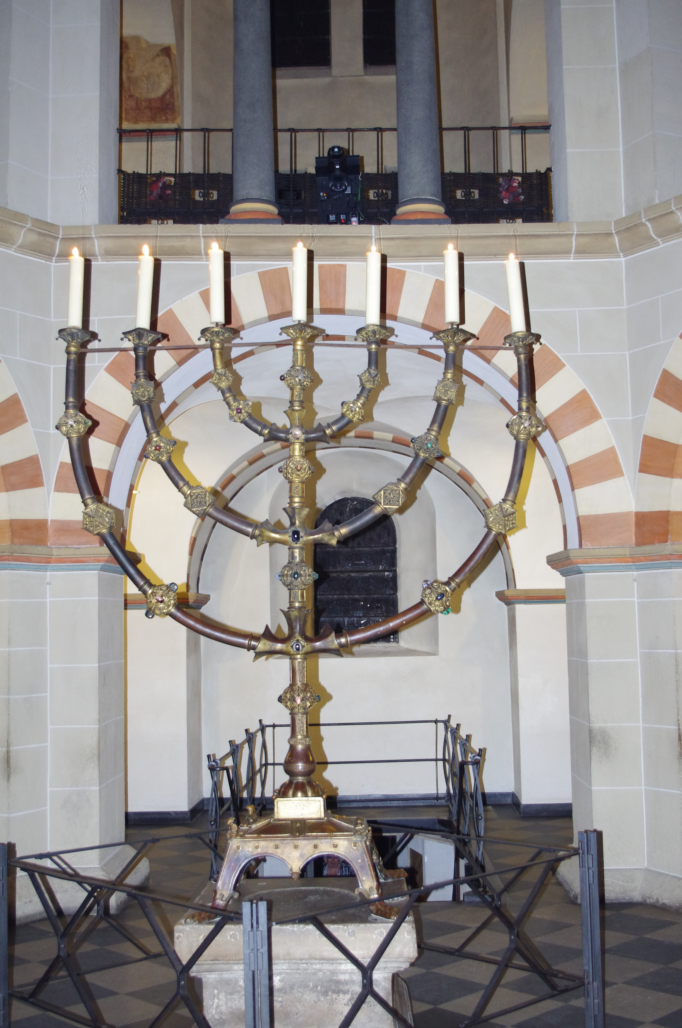 Der Siebenarmige Leuchter, erleuchtet am 5. November 2010, dem 999ten Todestag seiner Stifterin Äbtissin Mathilde